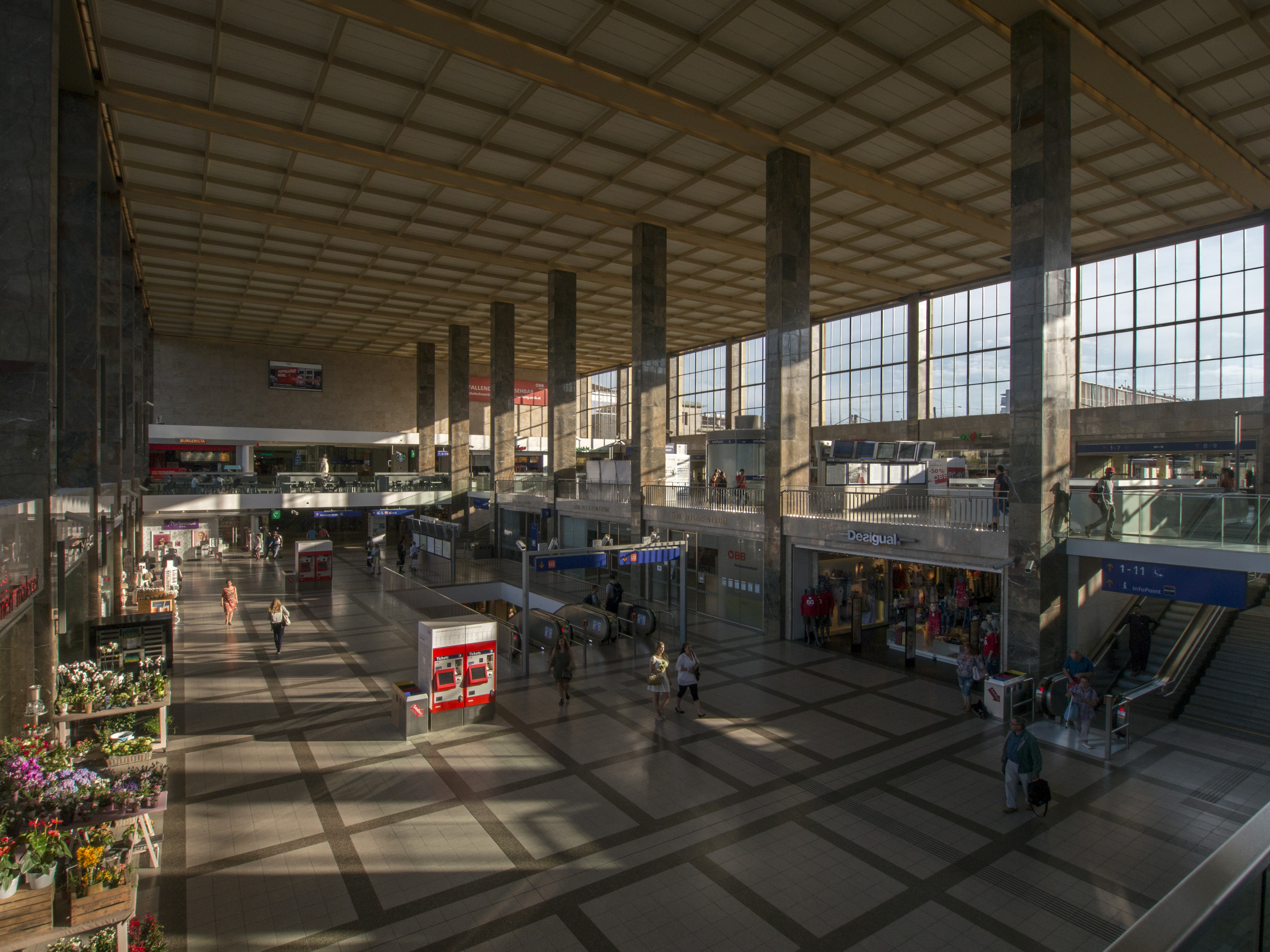 Wien Westbahnhof Bahnhofshalle